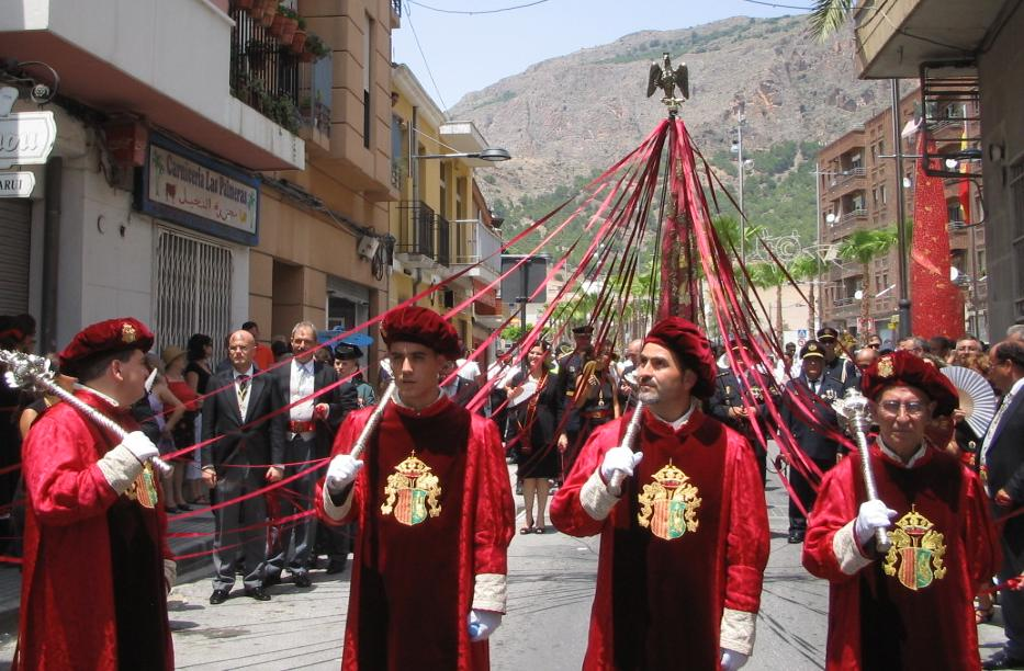 Maceros y autoridades en el desfile de la Enseña del Oriol del 17 de julio, día de la Reconquista. Orihuela.